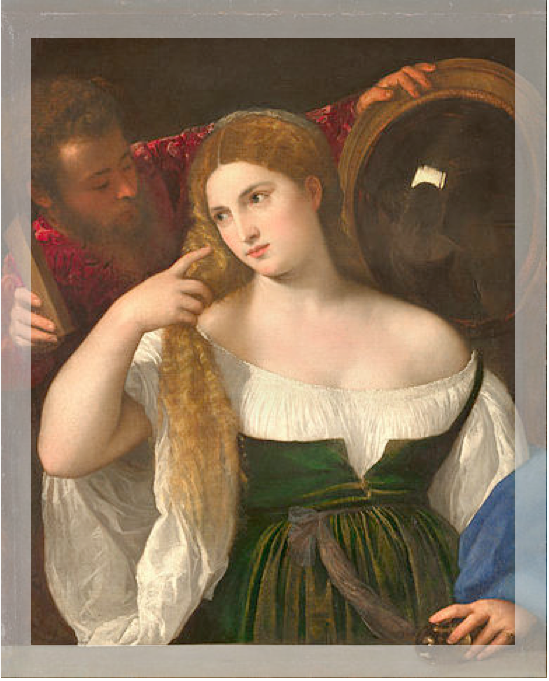 quatre bandes entourant l'œuvre ont été ajoutées après sa création